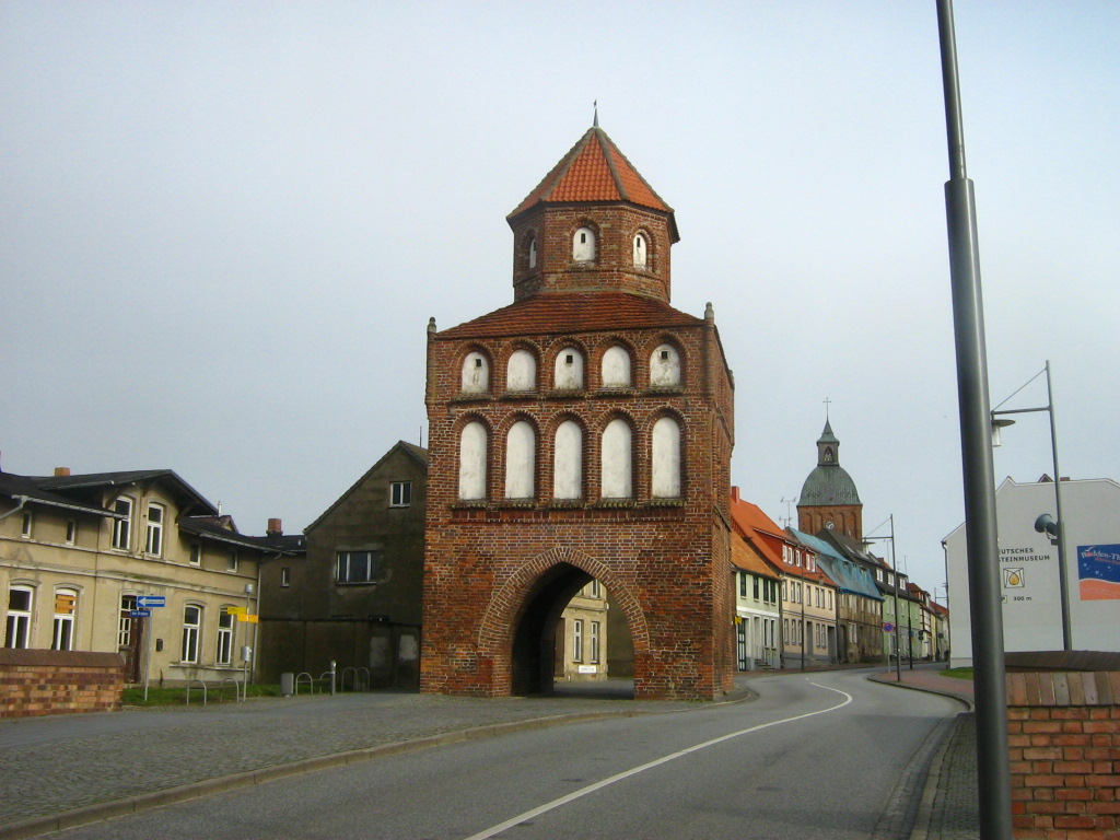 Das Rostocker Tor in Ribnitz-Damgarten